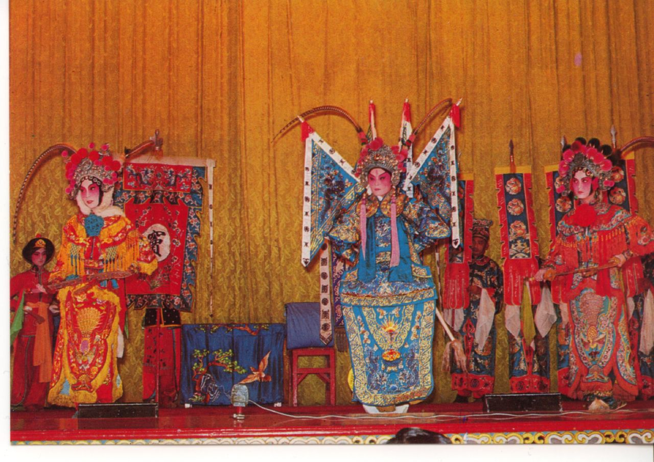 Taiwan: Opera scene